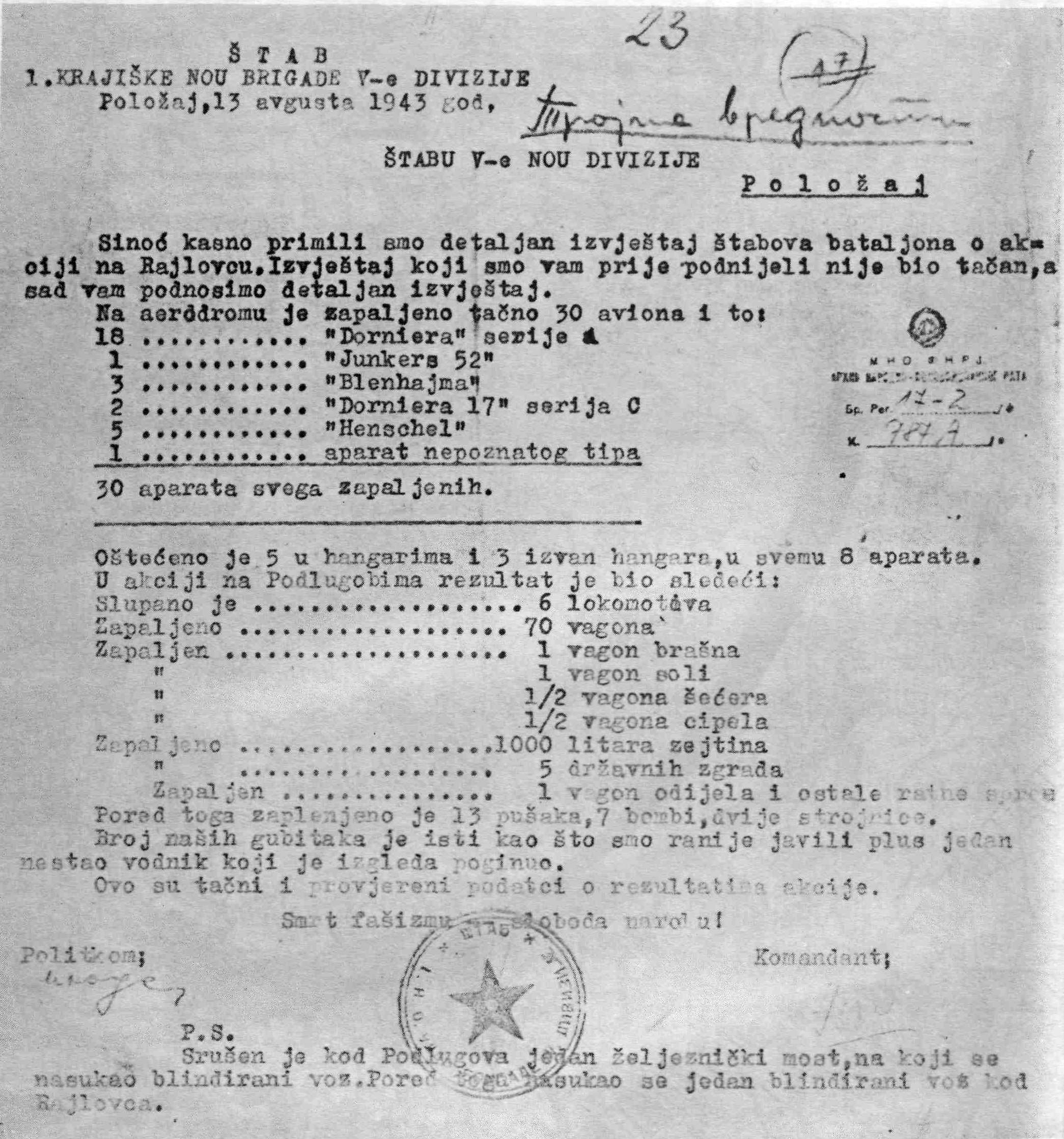 Извештај штаба Прве крајишке бригаде штабу Пете крајишке дивизије о акцији у Рајловцу